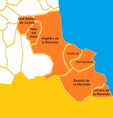 Mapa del Cantó de la Costa Vermella elaborat a partir d'un mapa de lliure disposició